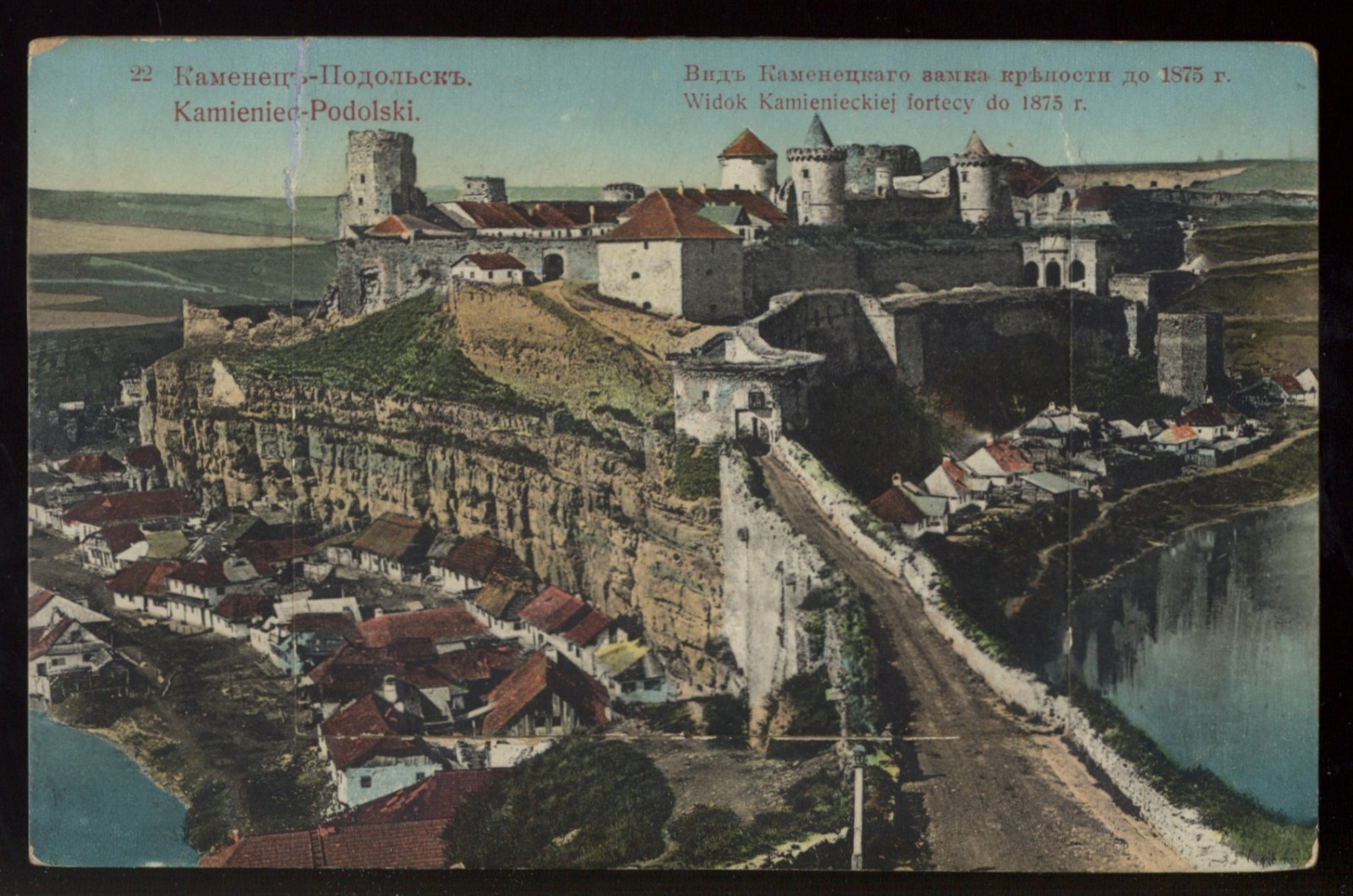 Кам'янець до 1875 р.